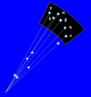 A Delfin csillagkép hat fényes csillaga távolságának és alakjának ábrázolása